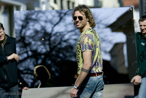 Linas "Ezopas" Karalius, ex ŽAS narys